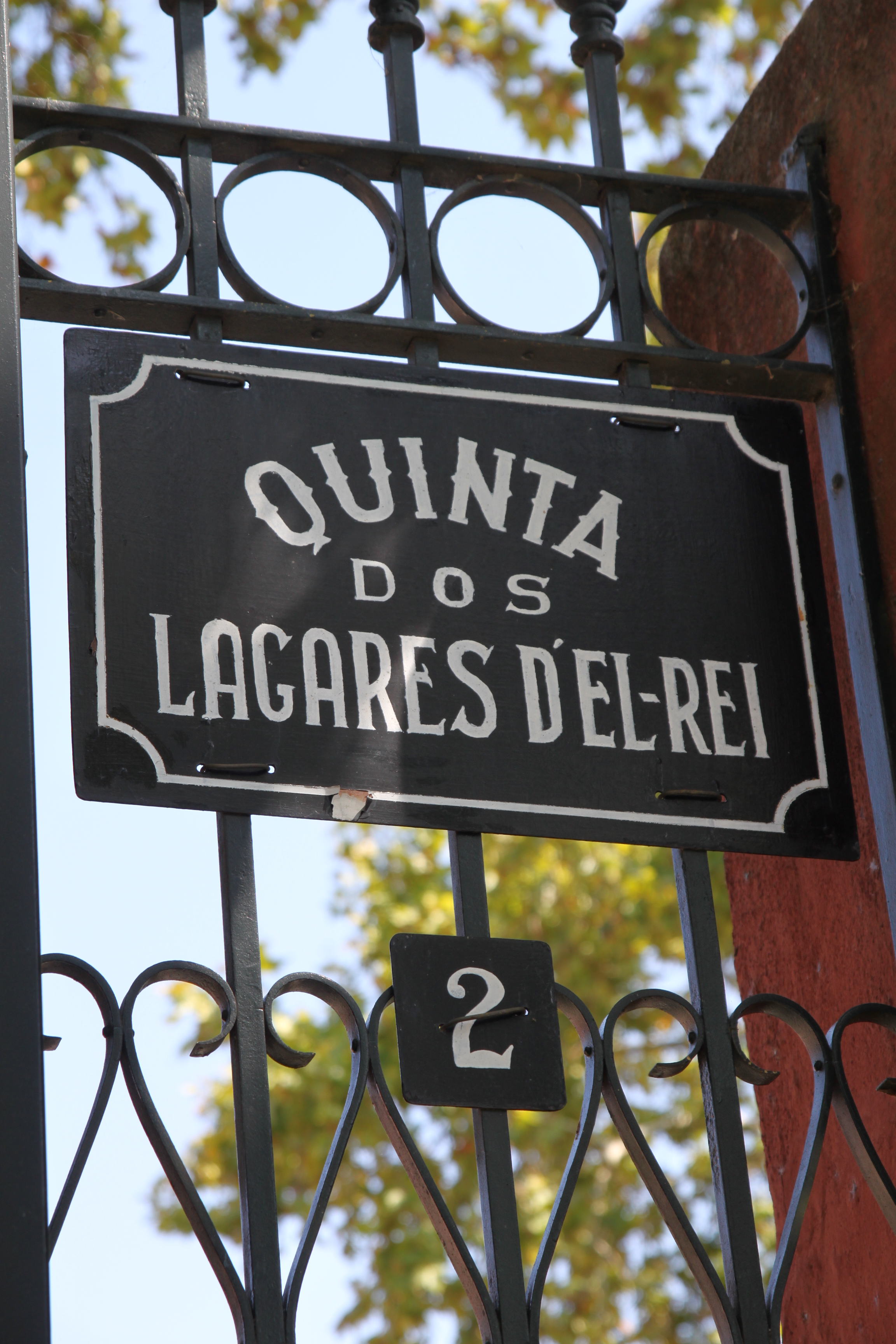 Quinta dos Lagares d'El-Rei This file was uploaded for Wiki Loves Monuments in Portugal with the unique identifier 75032.